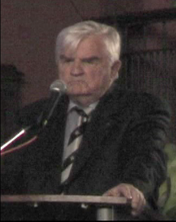 Sir John H. Noble im Juli 2007 bei einem Vortrag in Nossen